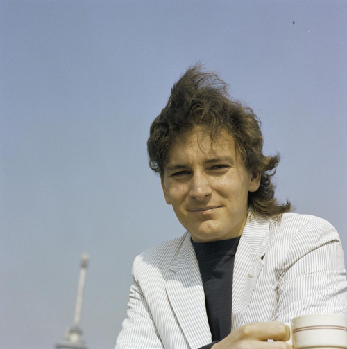 De Zweedse zanger Tomas Ledin tijdens een fotosessie voor het Eurovisie Songfestival 1980